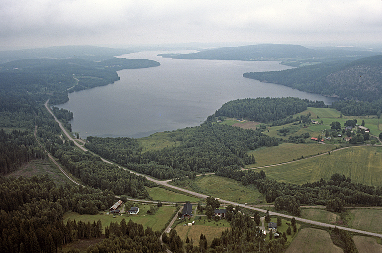 Sjön Racken. Bilden troligen från mitten av 1980-talet. Motiv: Racken Nyckelord: Flygbilder Kategori: Insjömiljöer Sjön Racken. Bilden troligen från mitten av 1980-talet.